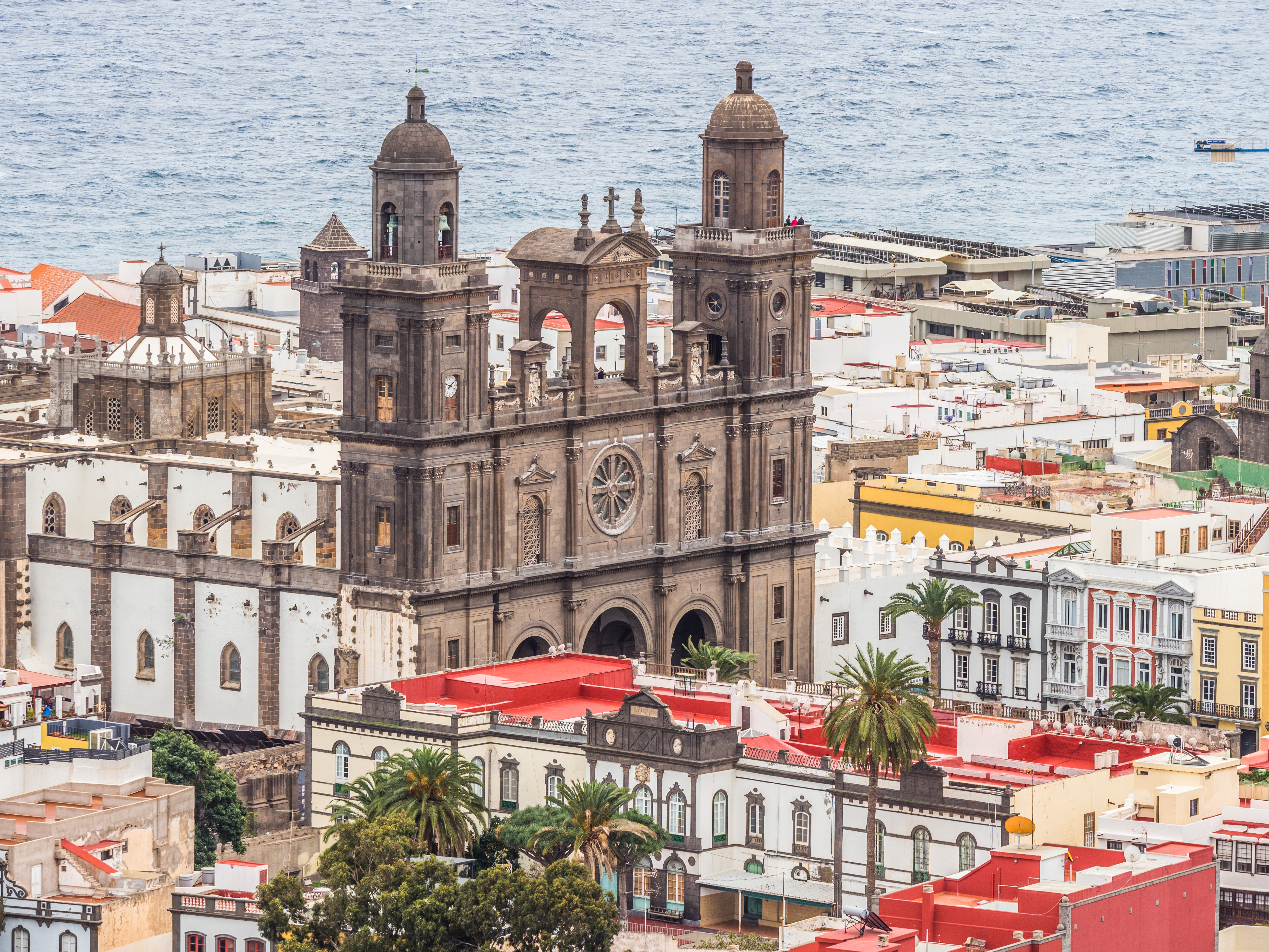 Las Palmas, Gran Canaria, January 2018